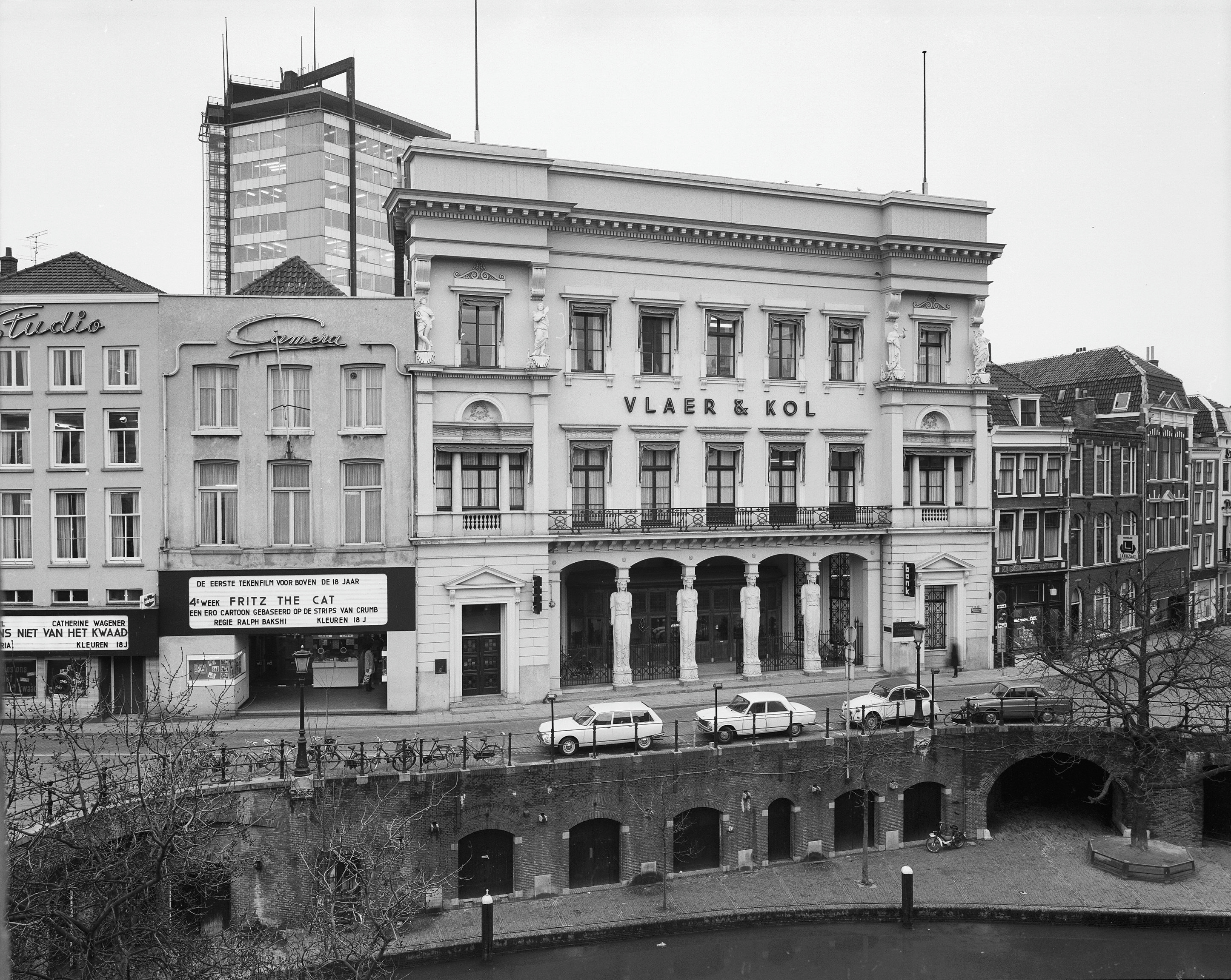 Vlaer En Kol: gevel voorzijde